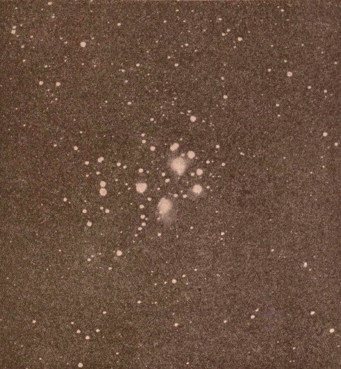 L’amas des Pléiades, photographié le 11 mars 1907